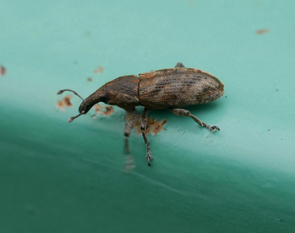 Lixus acutipennis：ハスジカツオゾウムシ 2018/07/08 和歌山県串本町：Kushimoto town. Wakayama Pref. Japan